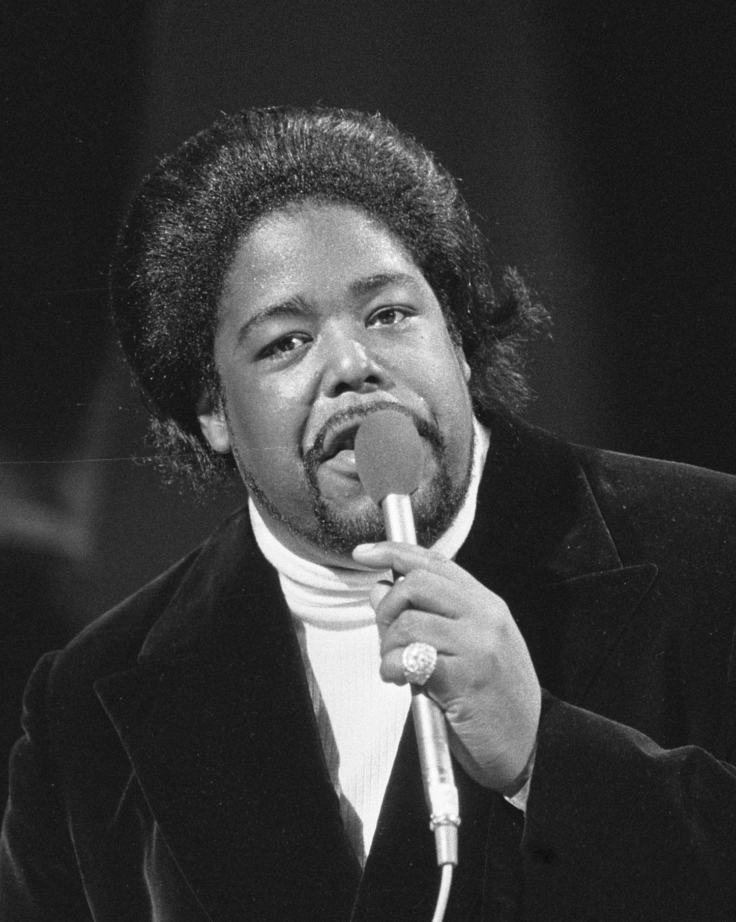 Collectie / Archief : Fotocollectie Anefo Reportage / Serie : Grand Gala du Disque in de RAI Beschrijving : Barry White Datum : 17 februari 1974 Locatie : Amsterdam, Noord-Holland Trefwoorden : festivals, zangers Persoonsnaam : White, Barry Instellingsnaam : RAI Fotograaf : Fotograaf Onbekend / Anefo Auteursrechthebbende : Nationaal Archief Materiaalsoort : Negatief (zwart/wit) Nummer archiefinventaris : bekijk toegang 2.24.01.05 Bestanddeelnummer : 927-0098